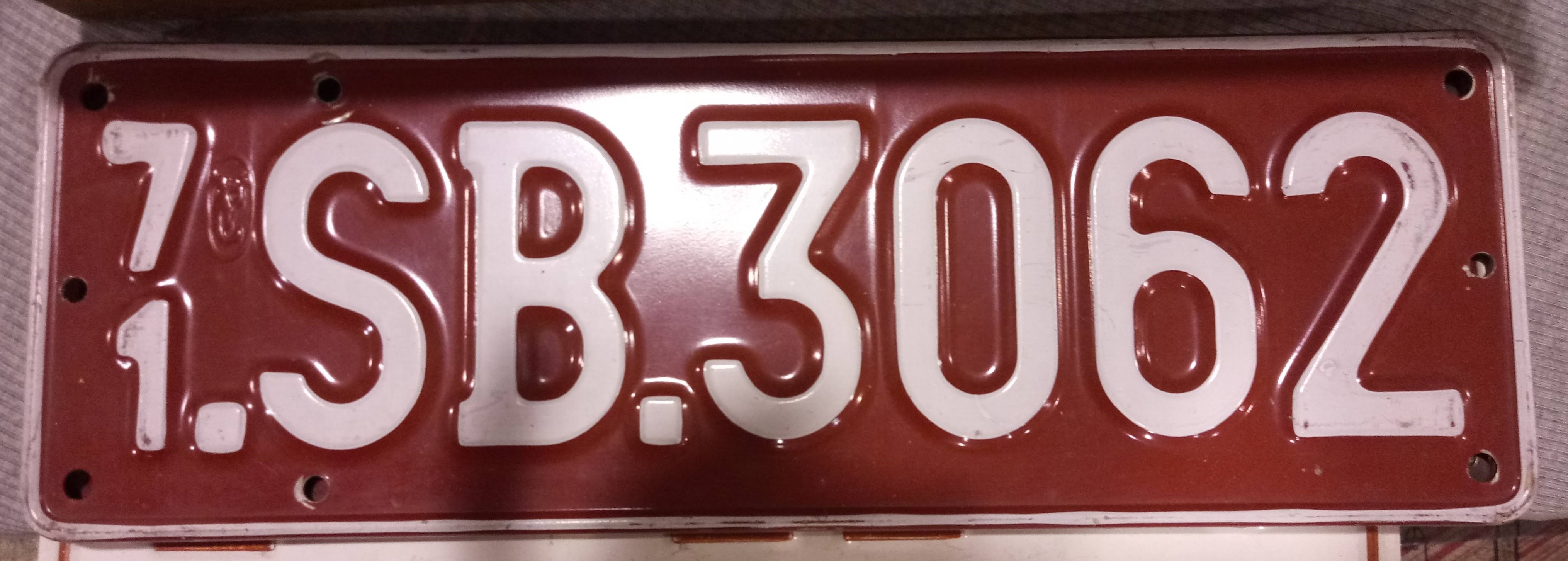 La foto, scattata il 01/11/2019 nel padiglione 5 di "Tuttinfiera" a Padova, rappresenta una targa (di un collezionista espositore) che era montata su un'autovettura della SHAPE (Supreme Headquarters Allied Powers Europe) di stanza in Belgio; a sinistra sono allineate in verticale le ultime due cifre dell'anno di validità, cioè il 1971. I colori erano invertiti rispetto alle targhe ordinarie.